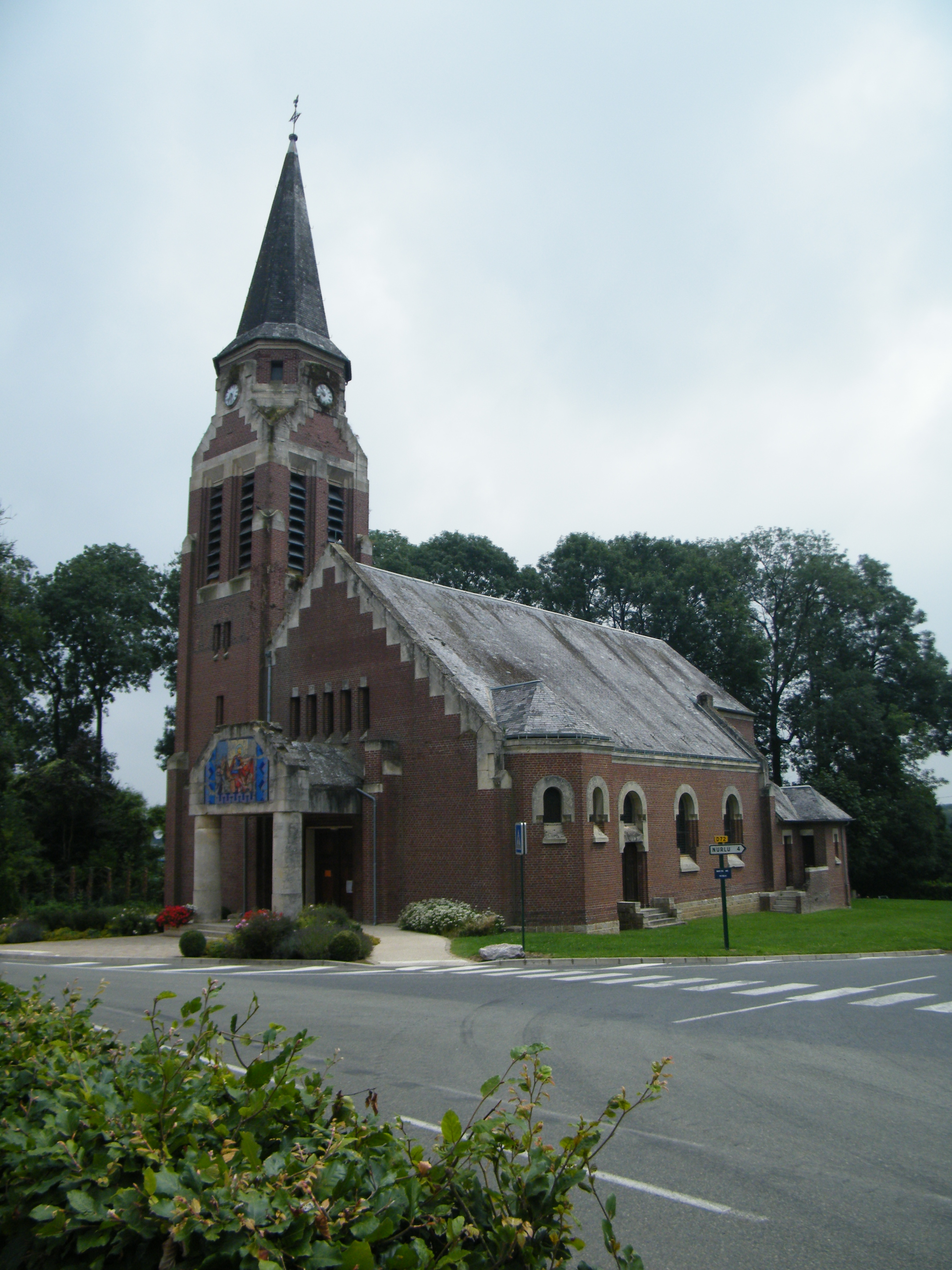 Eglise Saint-Martin de Manancourt.